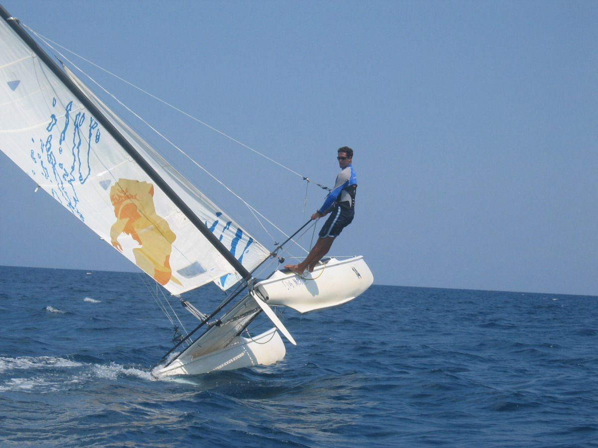 catamaran sailing on one hull